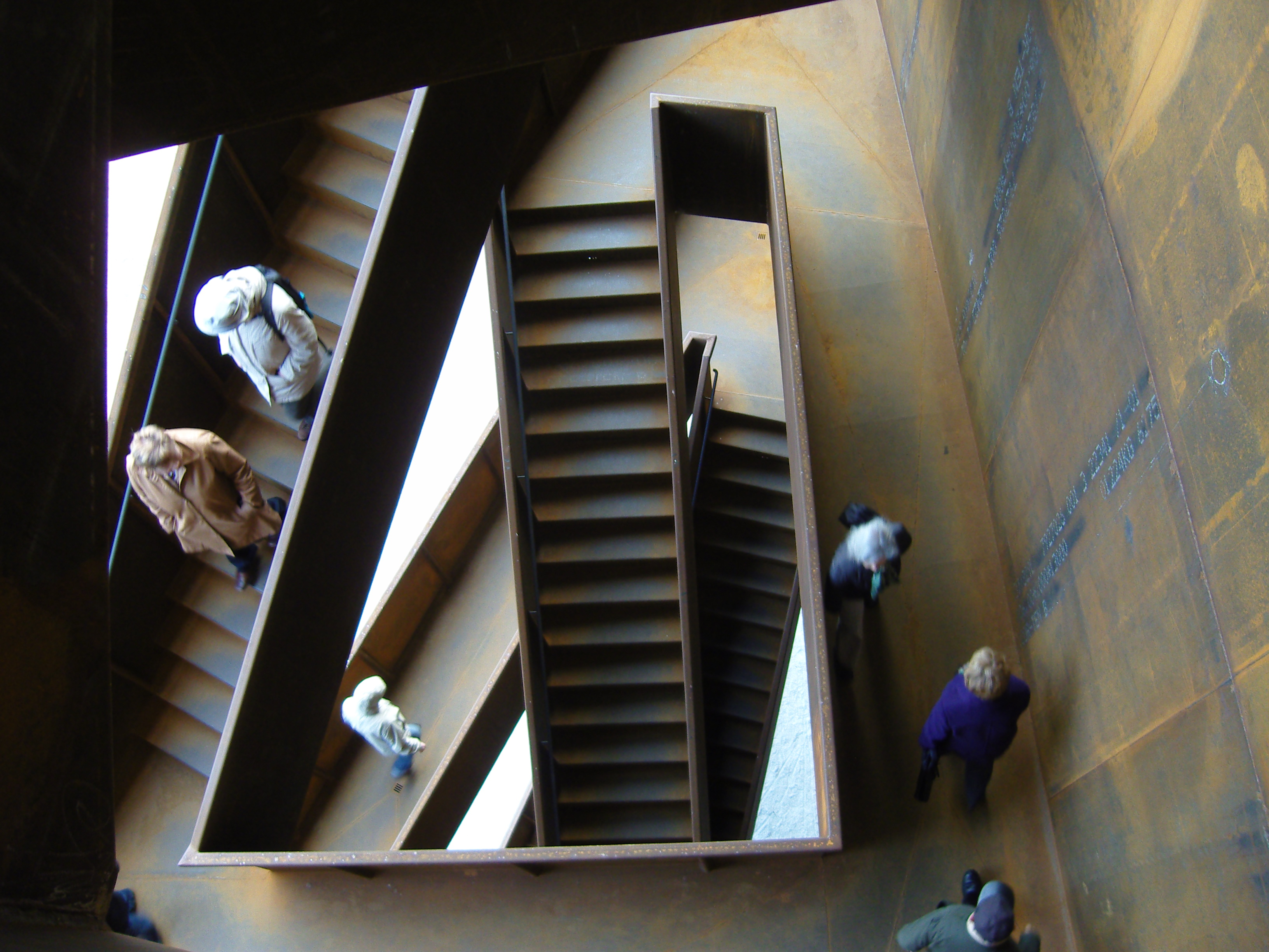 Treppen im Rostigen Nagel am Sornoer Kanal am Sedlitzer See